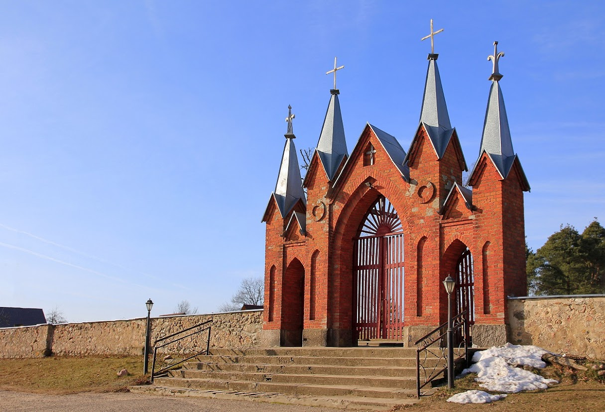 Івянец. Касцёл Святога Аляксея. Брама